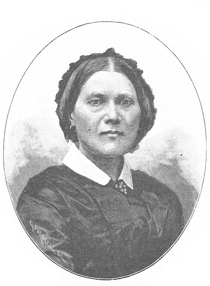 Maria Cederschiöld (1815-1892)